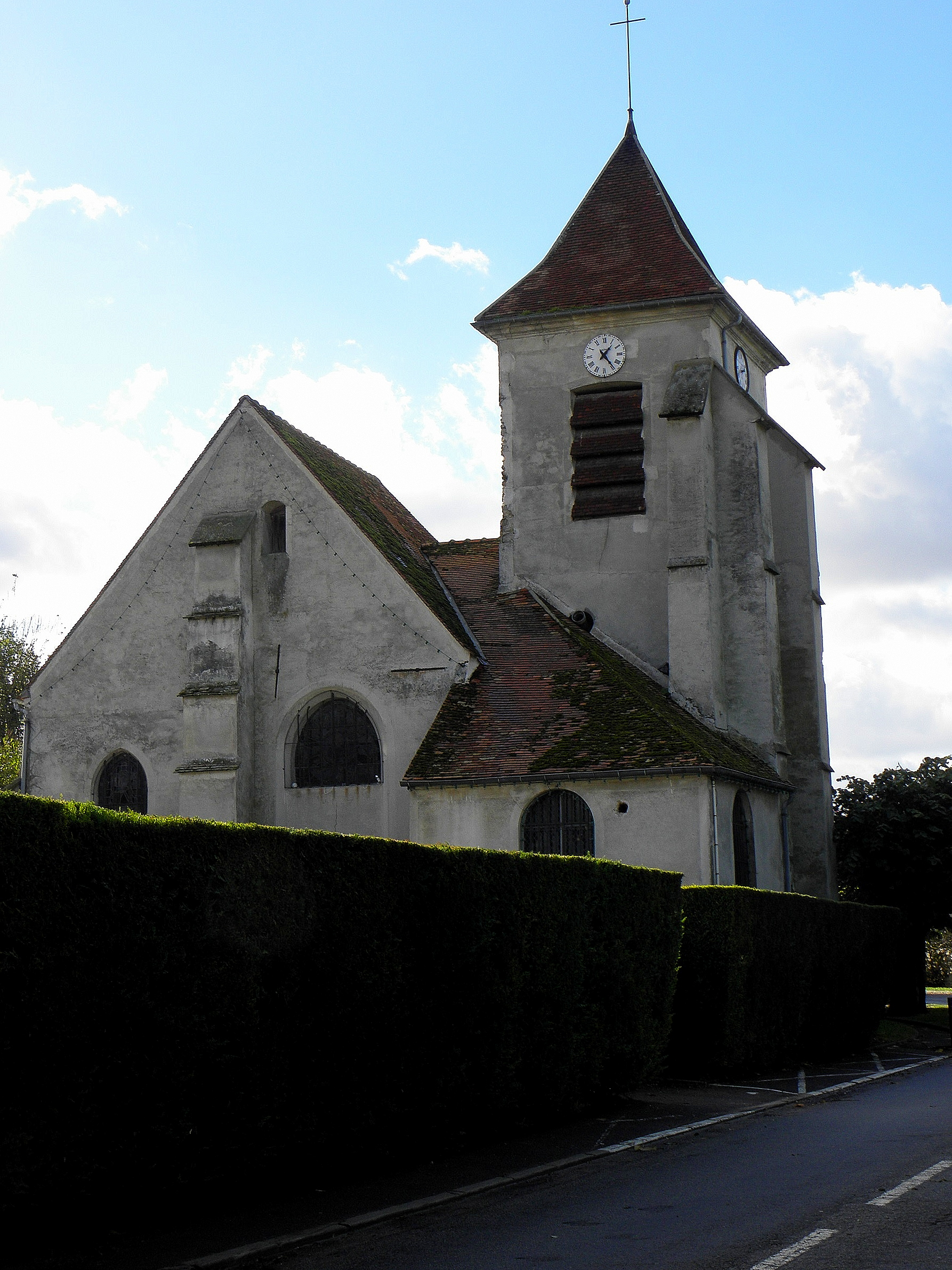 Église Notre-Dame-de-l'Assomption de Conches-sur-Gondoire (77).